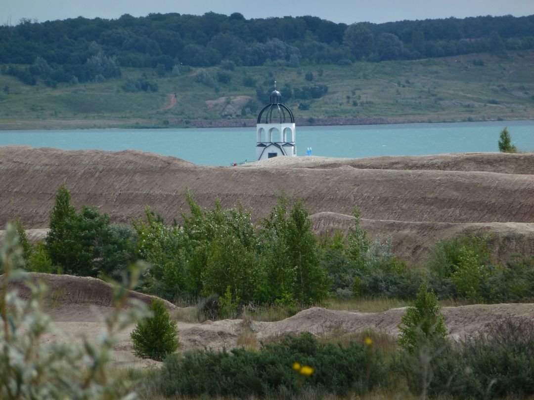 Göhrener Insel im Störmthaler See, dahinter die Kirche Vineta